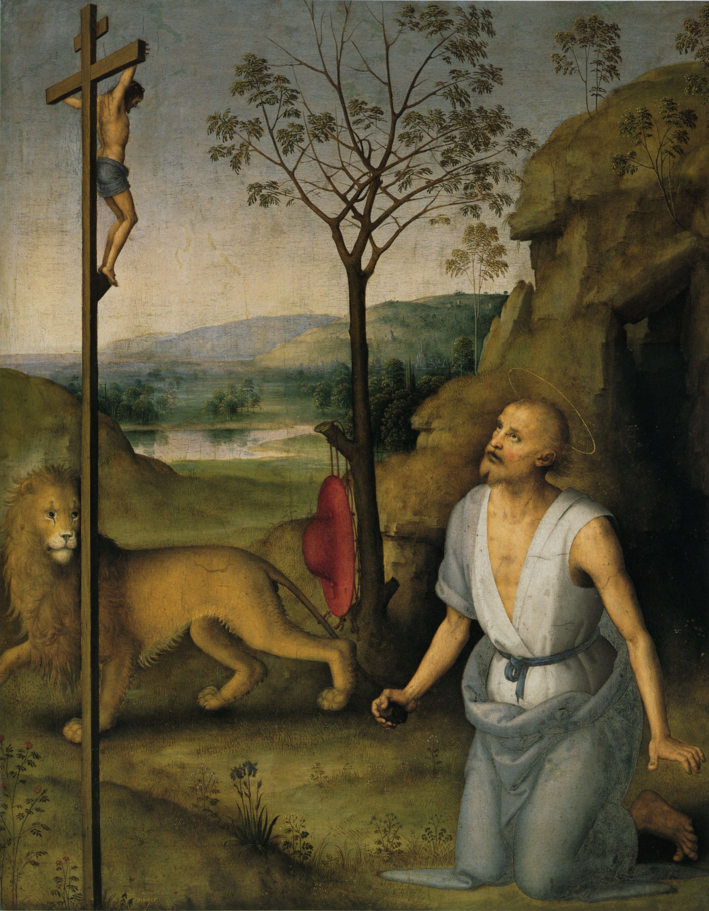 Pietro Perugino: San Girolamo. Cat. no. 88 in Vittoria Garibaldi: Perugino. Catalogo completo. Octavo, Firenze 2000, ISBN 88-8030-091-1